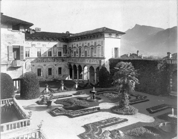 Sconosciuto morto da oltre 70 anni, foto giardino all'italiana di Villa Cicogna Mozzoni a Bisuschio del 1890.